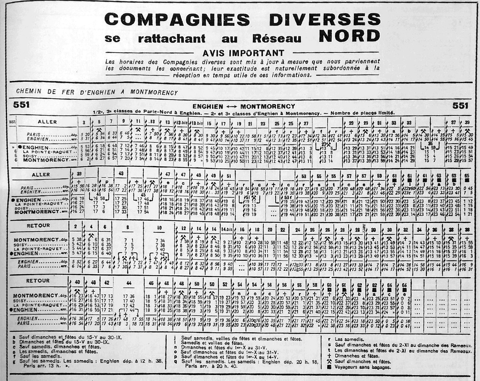 Horaires de la ligne Enghier - Montmorency